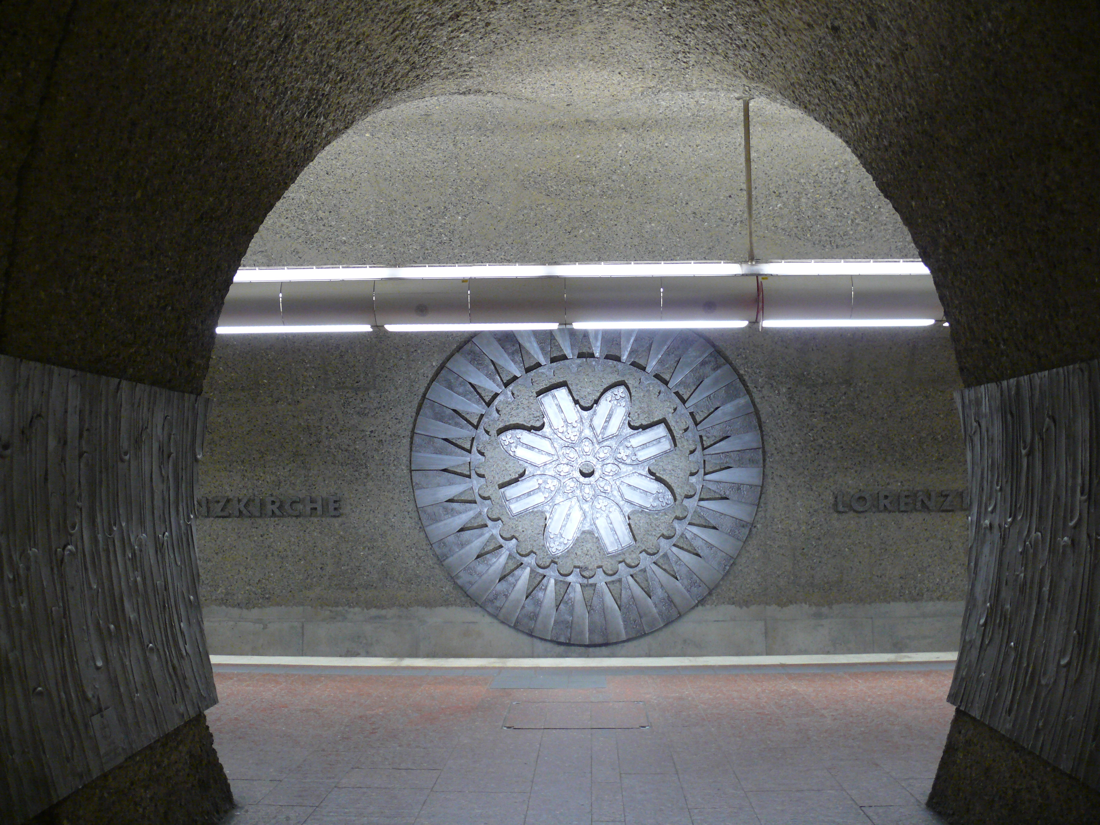 Eine Nachbildung des Rosettenfensters, auf Höhe der Querschläge am U-Bahnhof Lorenzkirche in Nürnberg.